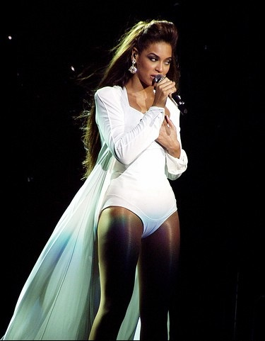 Beyonce durante el I am... Tour en Vancouver Canada